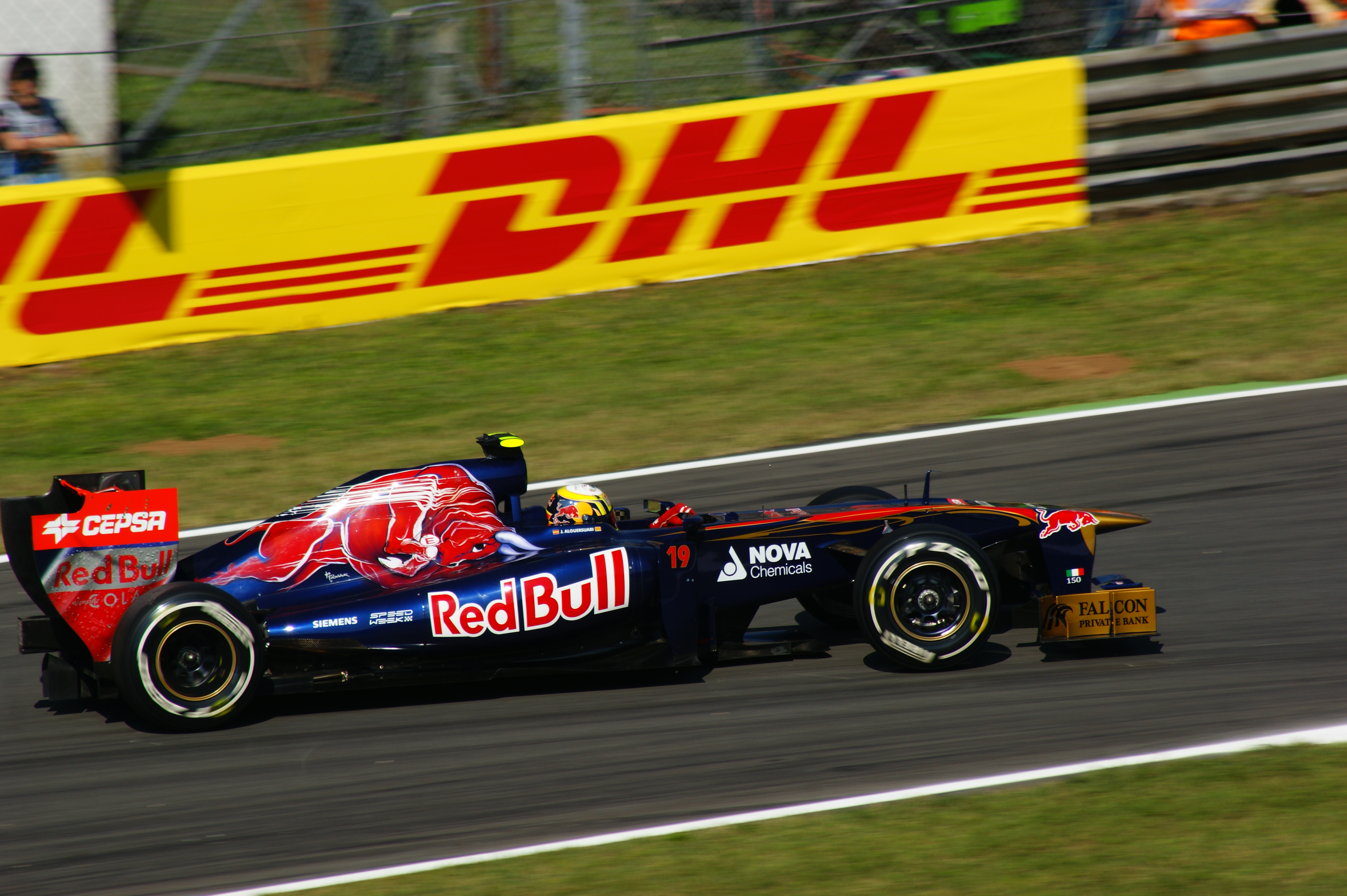 Jaime Alguersuari alla prima variante Monza 2011